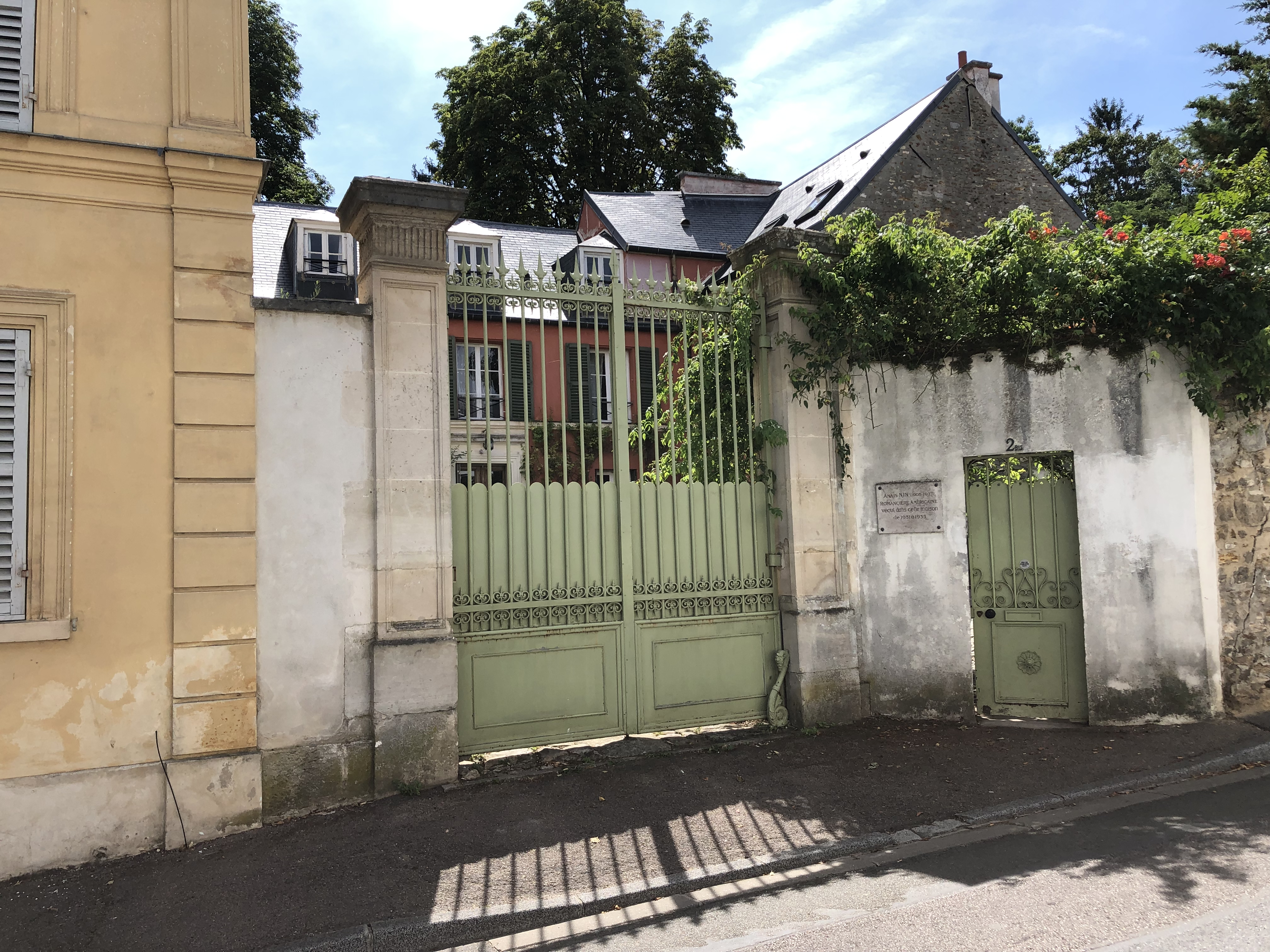 Maison d'Anais Nin à Montbuisson (Louveciennes)